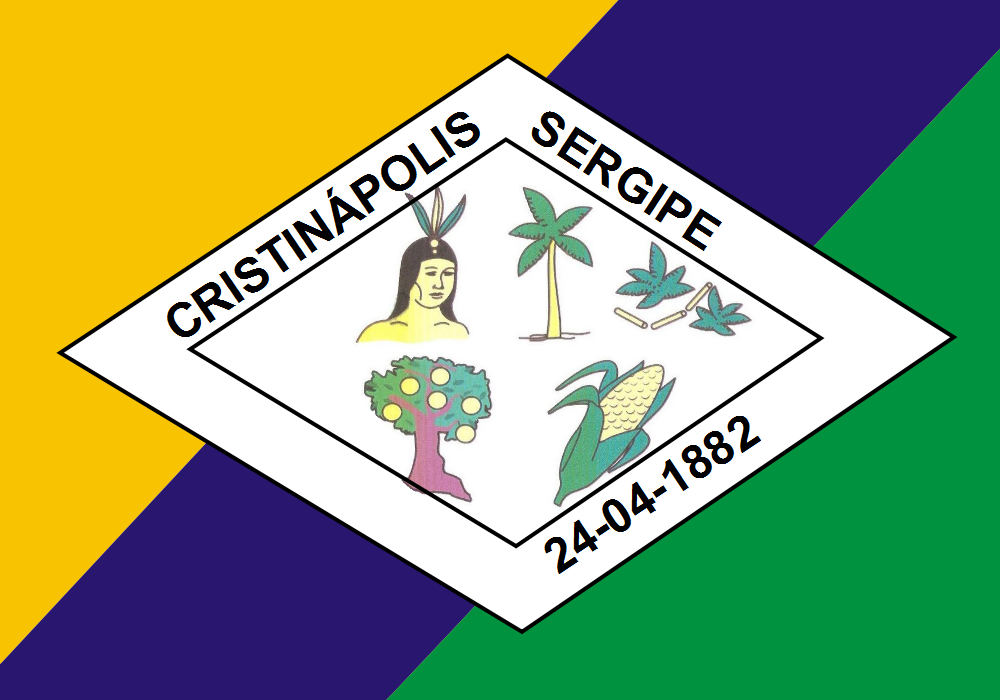 bandeira município Cristinápolis, Sergipe